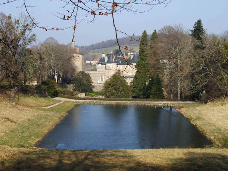 Chastellux vue est